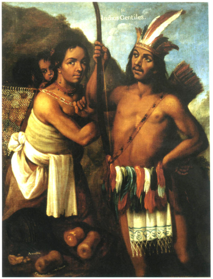 Pintura de Castas, 16. Indios gentiles.